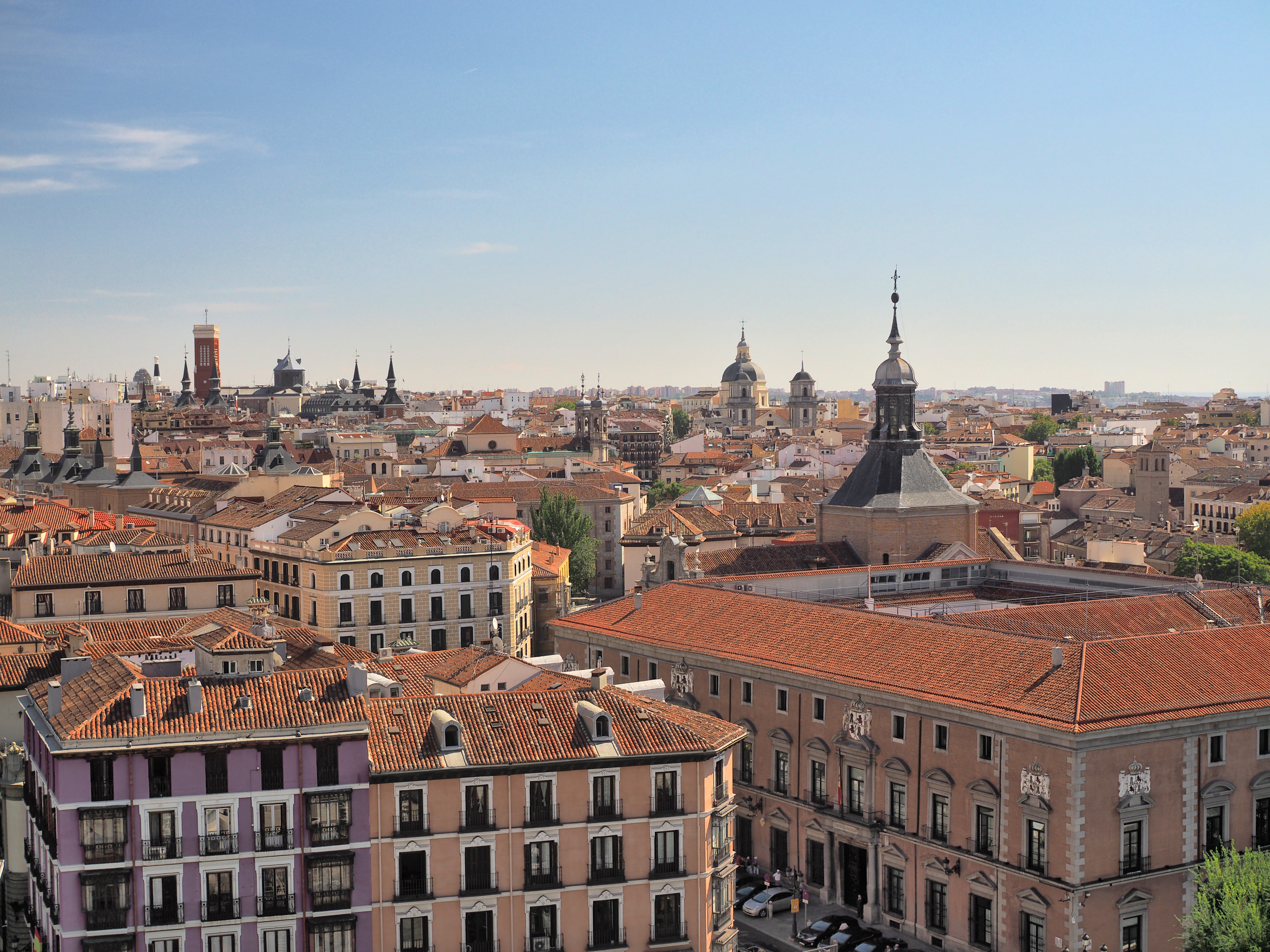 Madrid